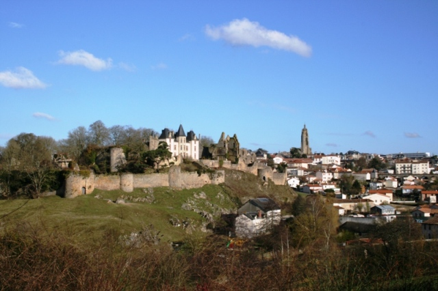 Français